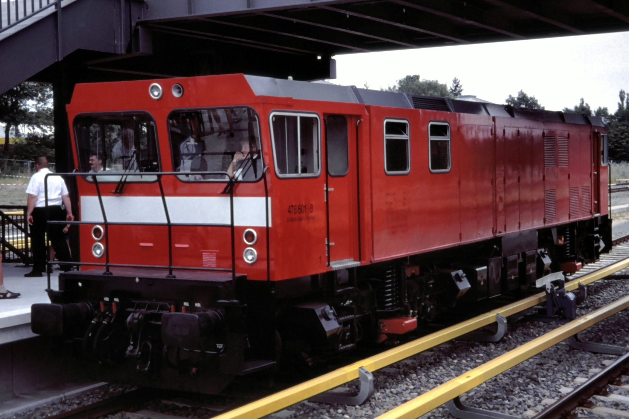 Gmeinder E/DE als 478 601-8 der S-Bahn Berlin GmbH in Berlin-Olympiastadion